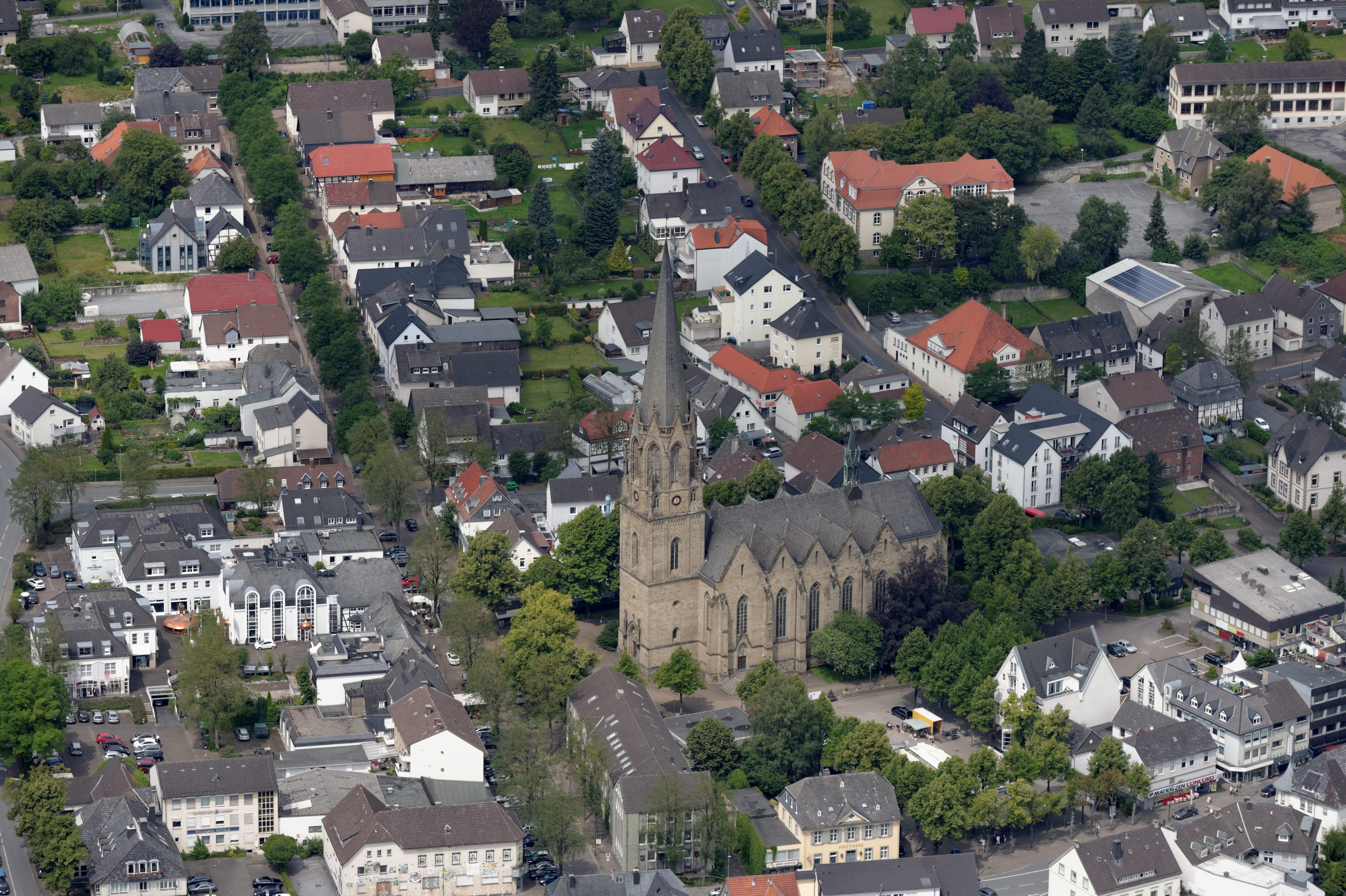 Fotoflug Sauerland Nord. Warstein, Stadtkirche St. Pankratius The making of this document was supported by the Community-Budget of Wikimedia Germany.